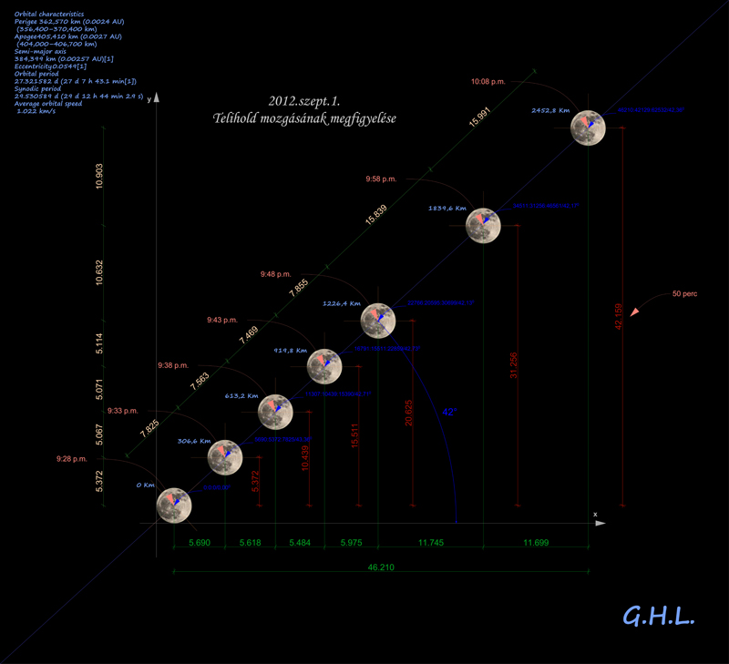 A Hold pályájának illusztrálása.